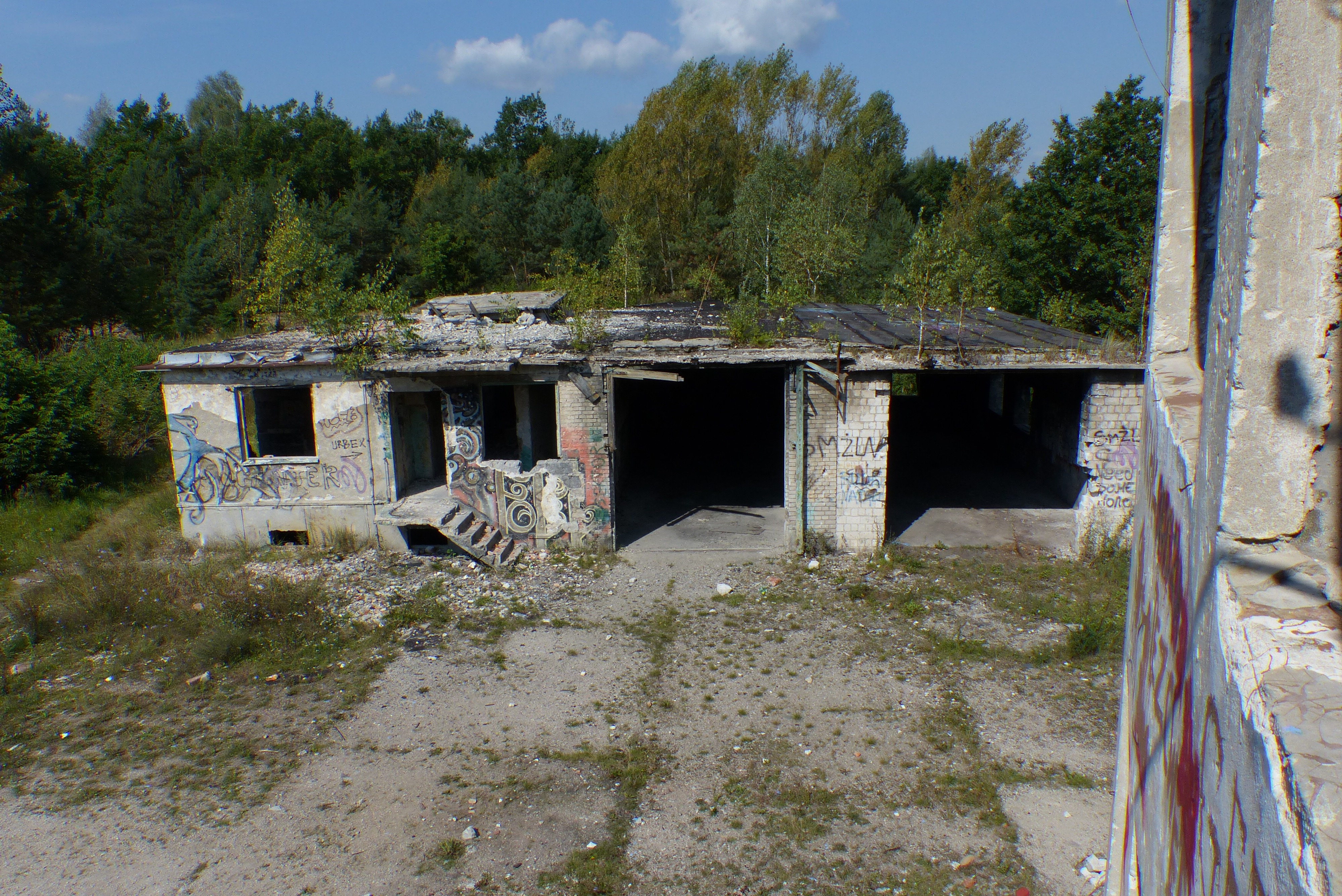 Object #1 - on the surface